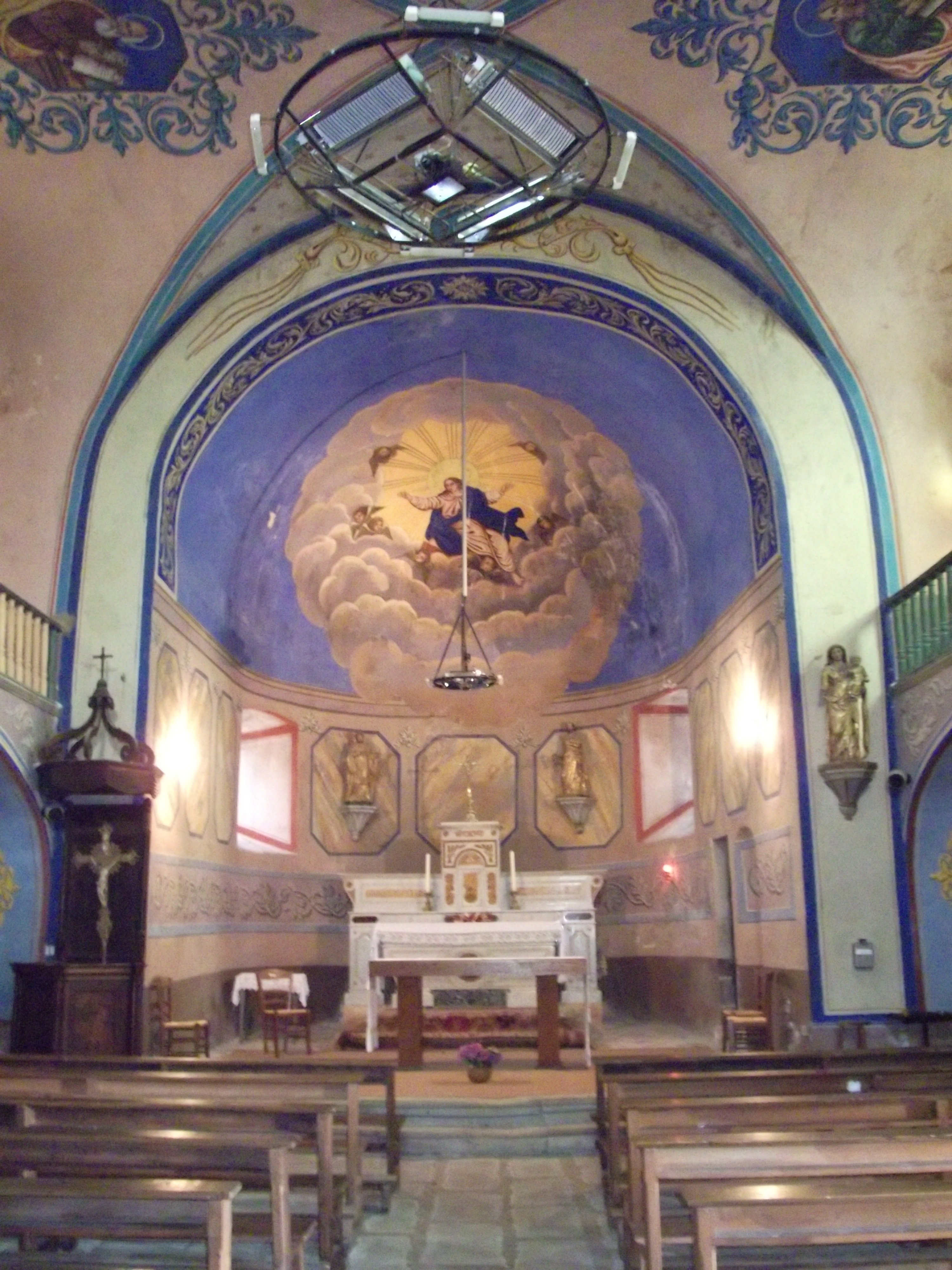 Choeur de l'église Saint-andéol de Saint-Andéol-de-Vals